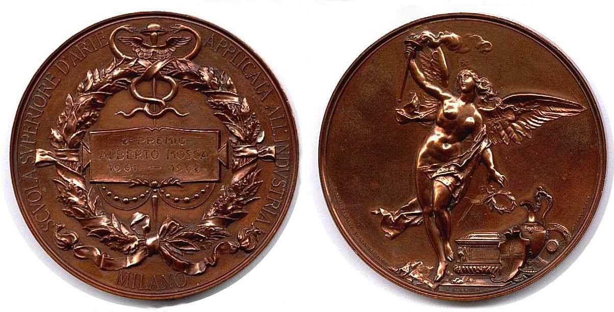 Medaglia di bronzo Scuola Superiore d'Arte applicata all'Industria Milano (meglio nota come Scuola del Castello Sforzesco di Milano). 2° premio Alberto Mosca 1961-1962 sezione Affresco